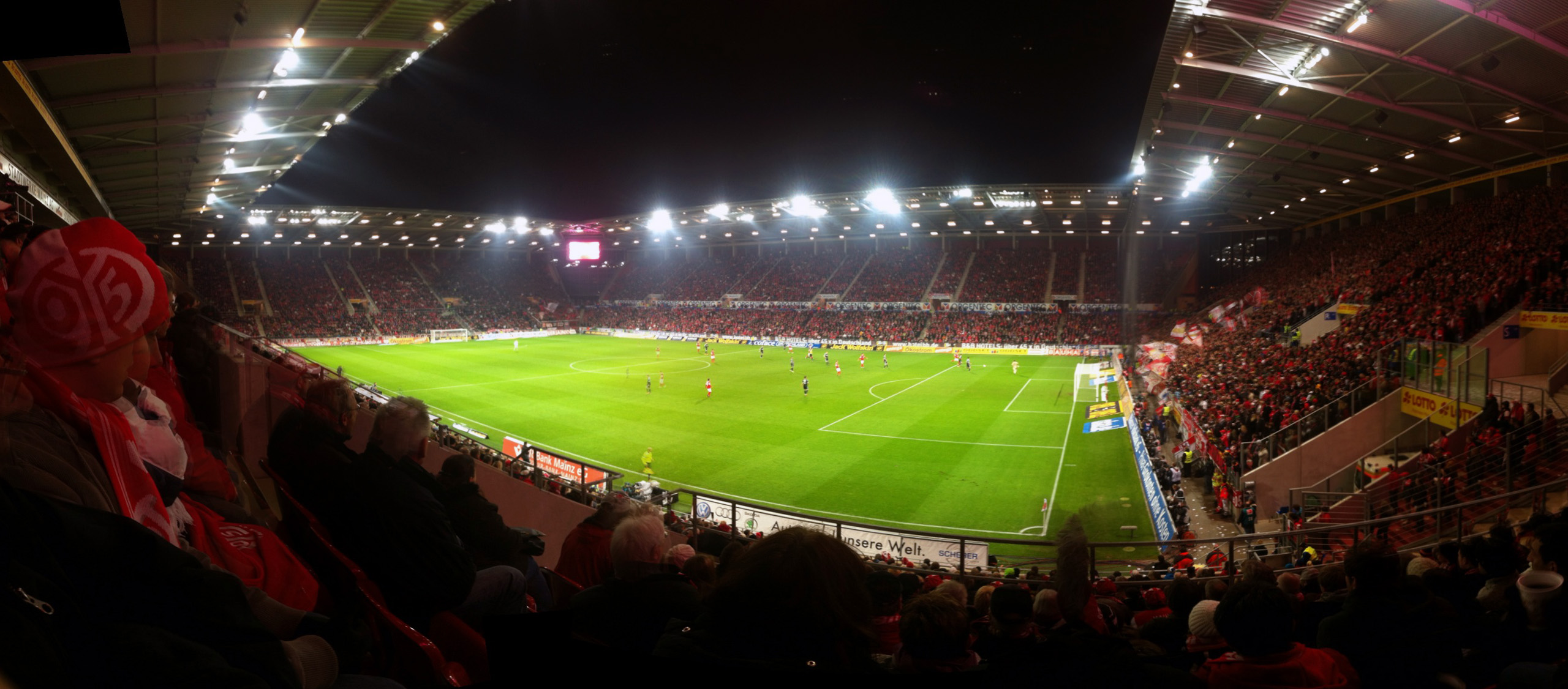 2012-11-09, Coface-Arena, 1. FSV Mainz 05 – 1. FC Nürnberg (2:1), Bundesliga, Panorama